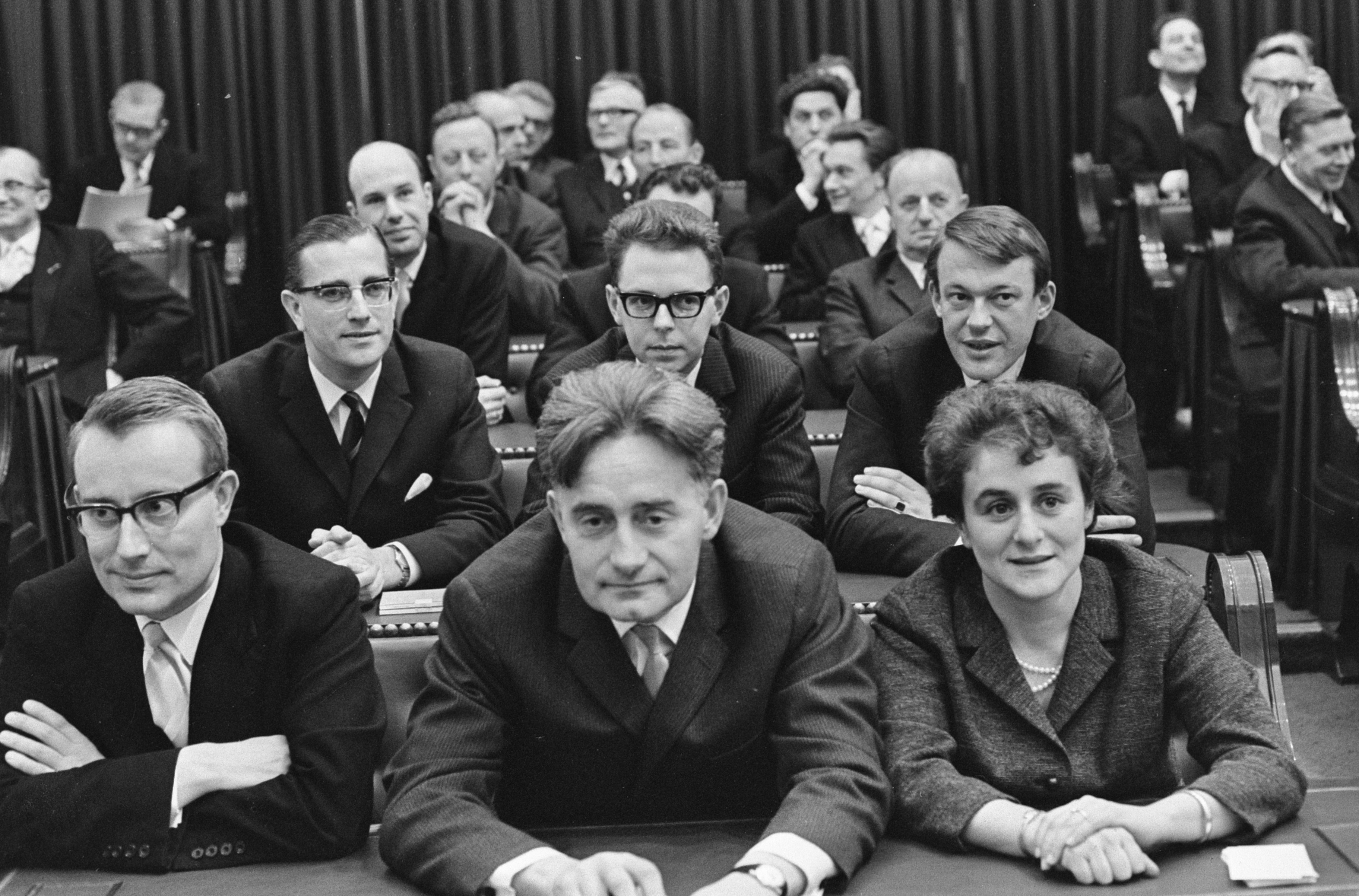 Collectie / Archief : Fotocollectie Anefo Reportage / Serie : [ onbekend ] Beschrijving : Tweede Kamer voor het eerst bijeen, de fractie D66 in d e banken Datum : 23 februari 1967 Trefwoorden : politiek Instellingsnaam : D66, Tweede Kamer Fotograaf : Kroon, Ron / Anefo Auteursrechthebbende : Nationaal Archief Materiaalsoort : Negatief (zwart/wit) Nummer archiefinventaris : bekijk toegang 2.24.01.05 Bestanddeelnummer : 920-1019